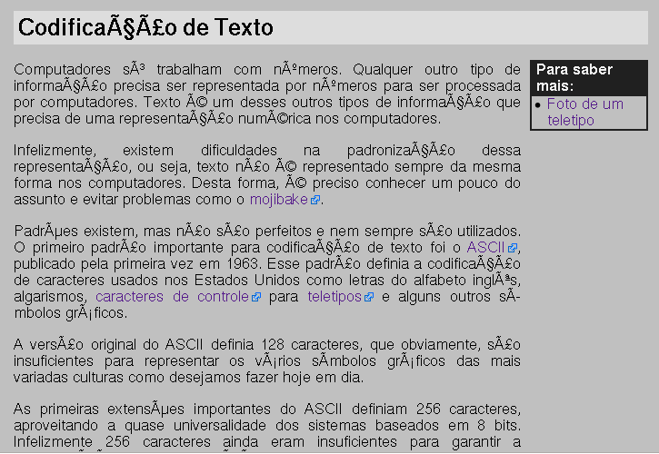 Texto codificado em UTF-8 e apresentado com se estivesse codificado em ISO-8859-1.